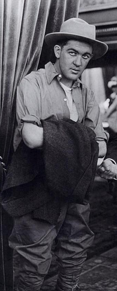 Fragmento de una fotografía mayor en la que aparece el actor Jack Ford en una imagen de la película The Adventures of Peg o' the Ring (1916), dirigida por su hermano Francis Ford.